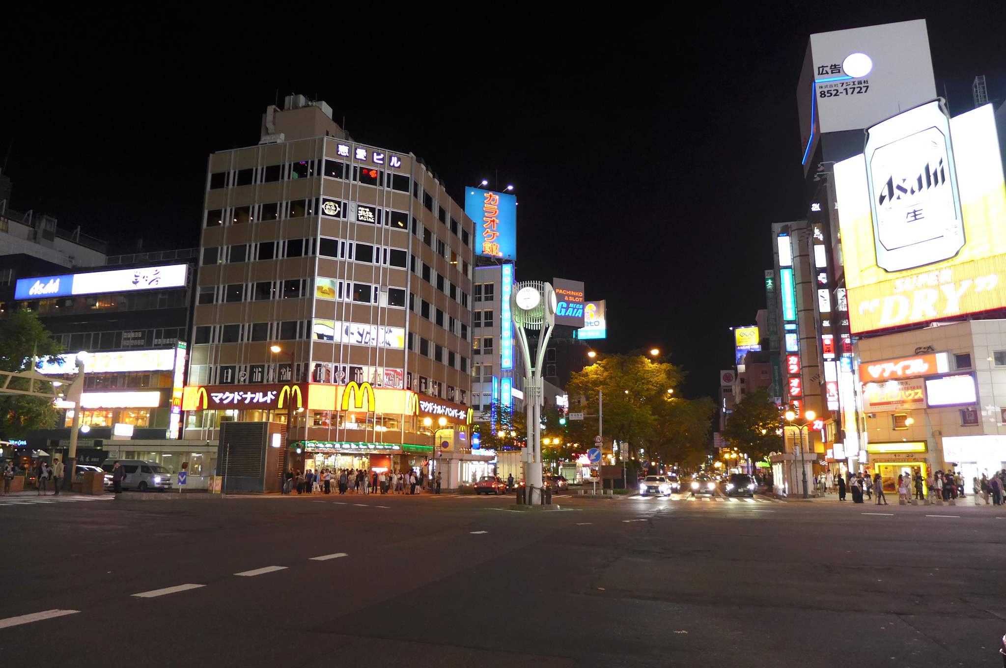 Susukino